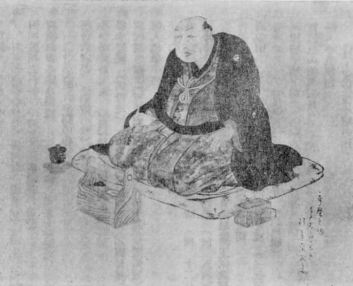 歌麿肖像画 栄之六十歳筆『浮世絵師伝』井上和雄編 渡辺版画店 1931